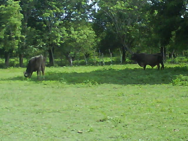 CAMPO DE SAN MARCOS GRO.